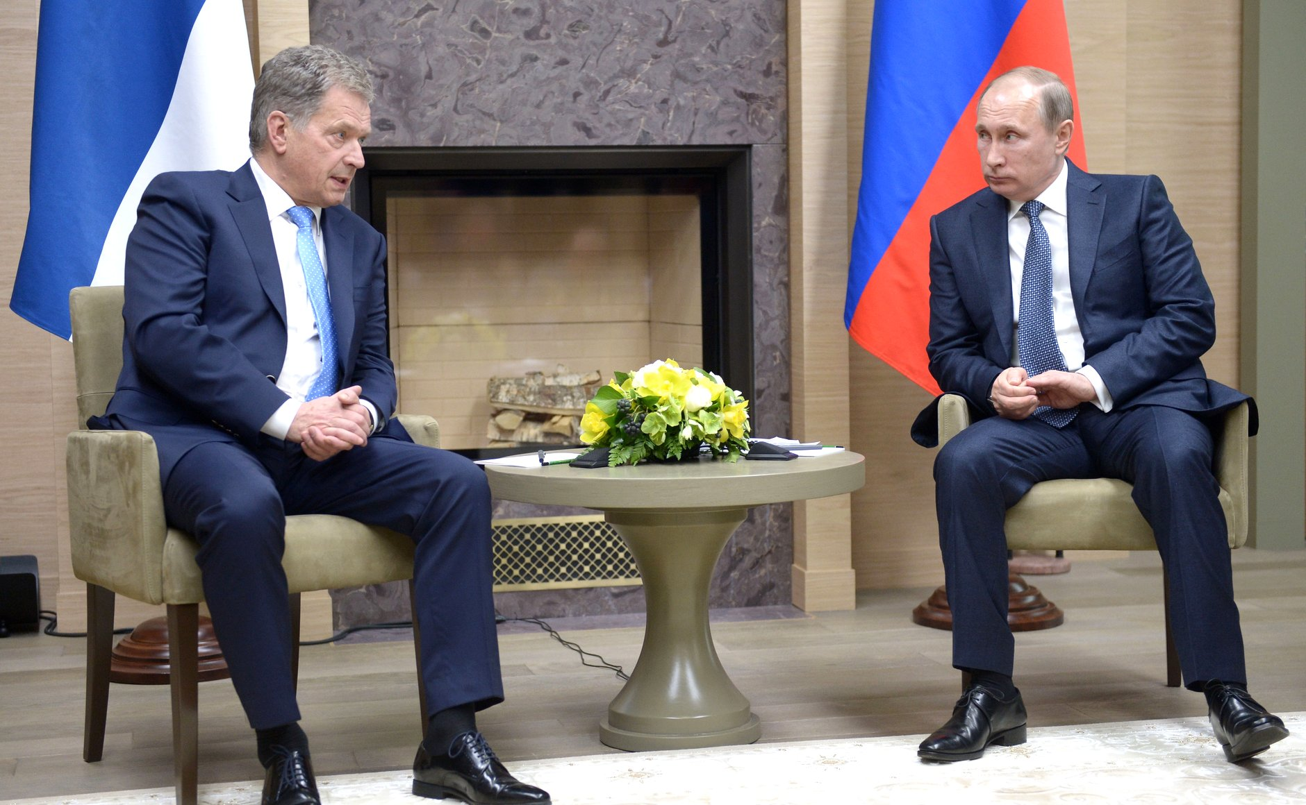 Встреча В.В. Путина с Президентом Финляндии Саули Ниинистё в Ново-Огарёво